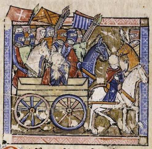 Jocelin Ier malade